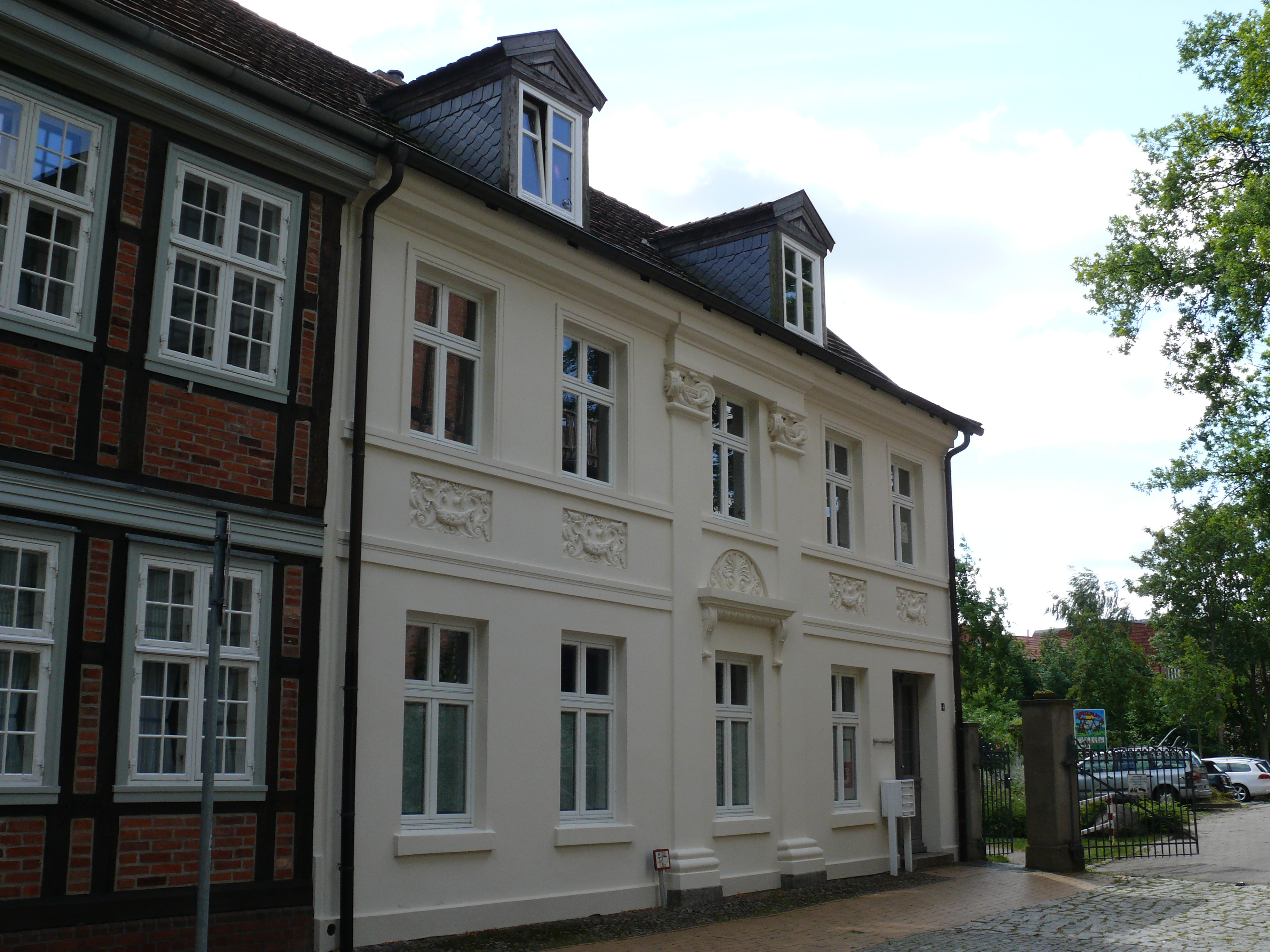 Das Gebäude "Lindenstraße 4" in Schwerin.